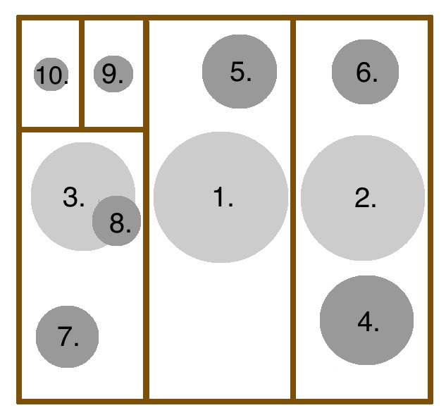 Hängung der Domglocken im Paulusdom Münster. Hellgrau die tontiefsten Glocken auf der unteren Ebene des Glockenstuhls, dunkelgrau die Glocken auf der oberen Ebene des Glockenstuhls.